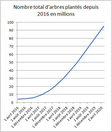 Évolution du nombre total d'arbres plantés par Ecosia entre 2016 et 2020